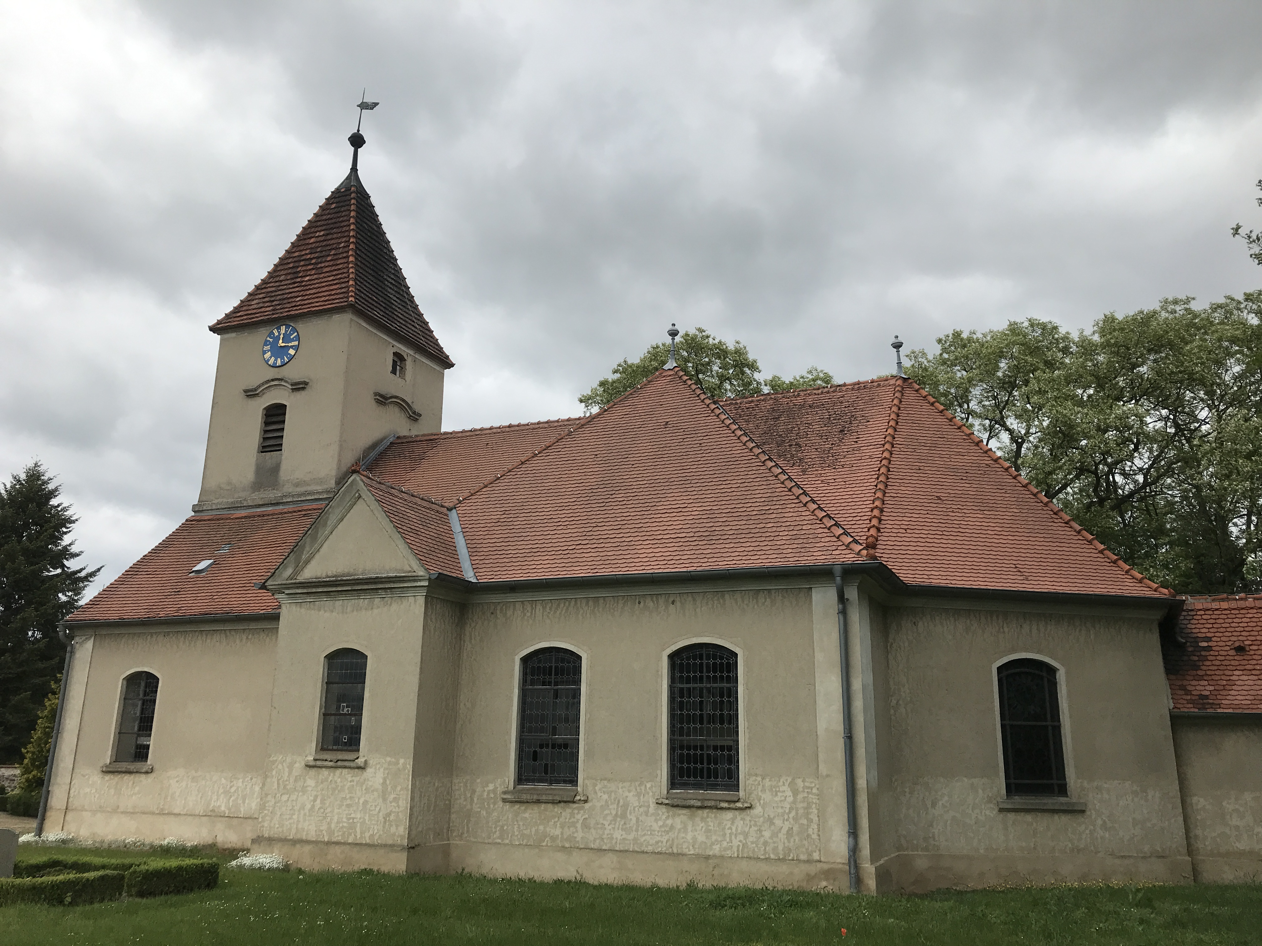 Die Dorfkirche Krahne ist eine Saalkirche im gleichnamigen Ortsteil der Gemeinde Kloster Lehnin im Landkreis Potsdam-Mittelmark in Brandenburg. Im Innern steht unter anderem ein Wappengrabstein, der an den 1741 verstorbenen von Roßkampf erinnert.